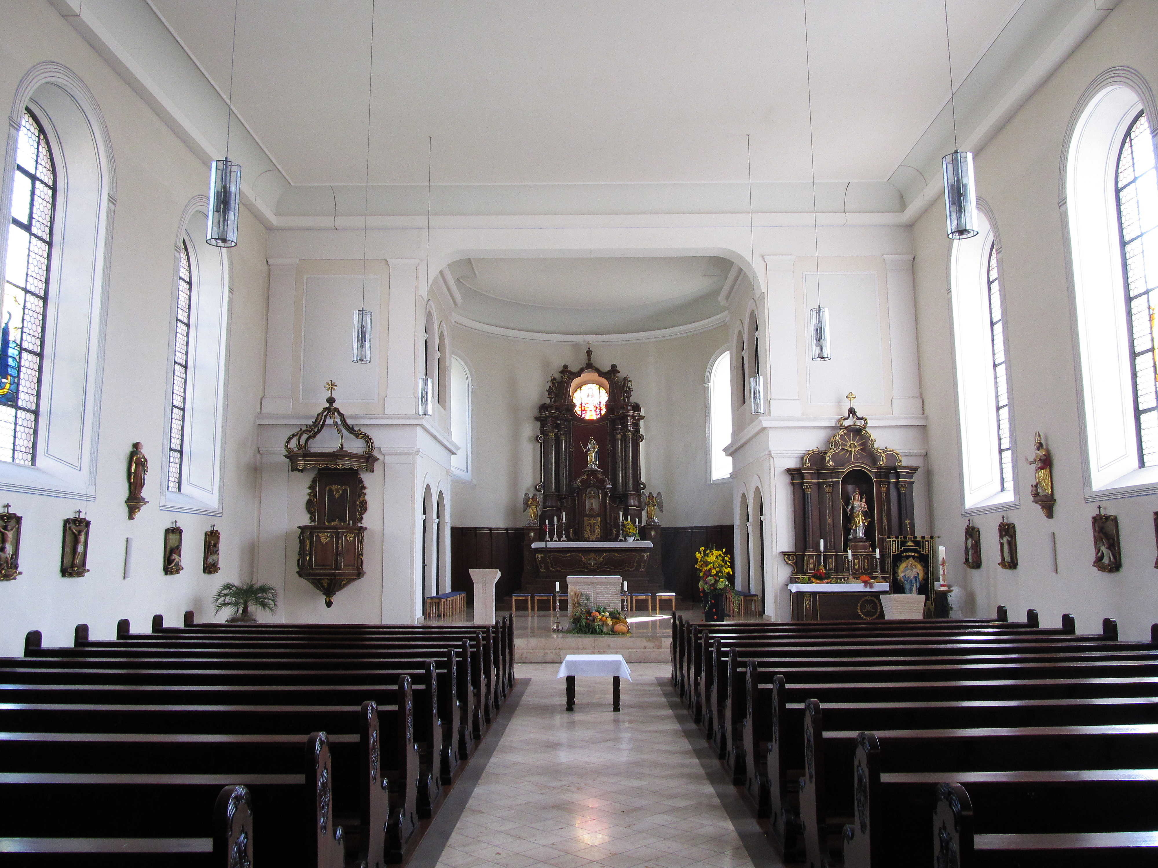 Blick ins Innere der katholischen Pfarrkirche Mariä Heimsuchung in Auersmacher, einem Ortsteil von Kleinblittersdorf, Regionalverband Saarbrücken